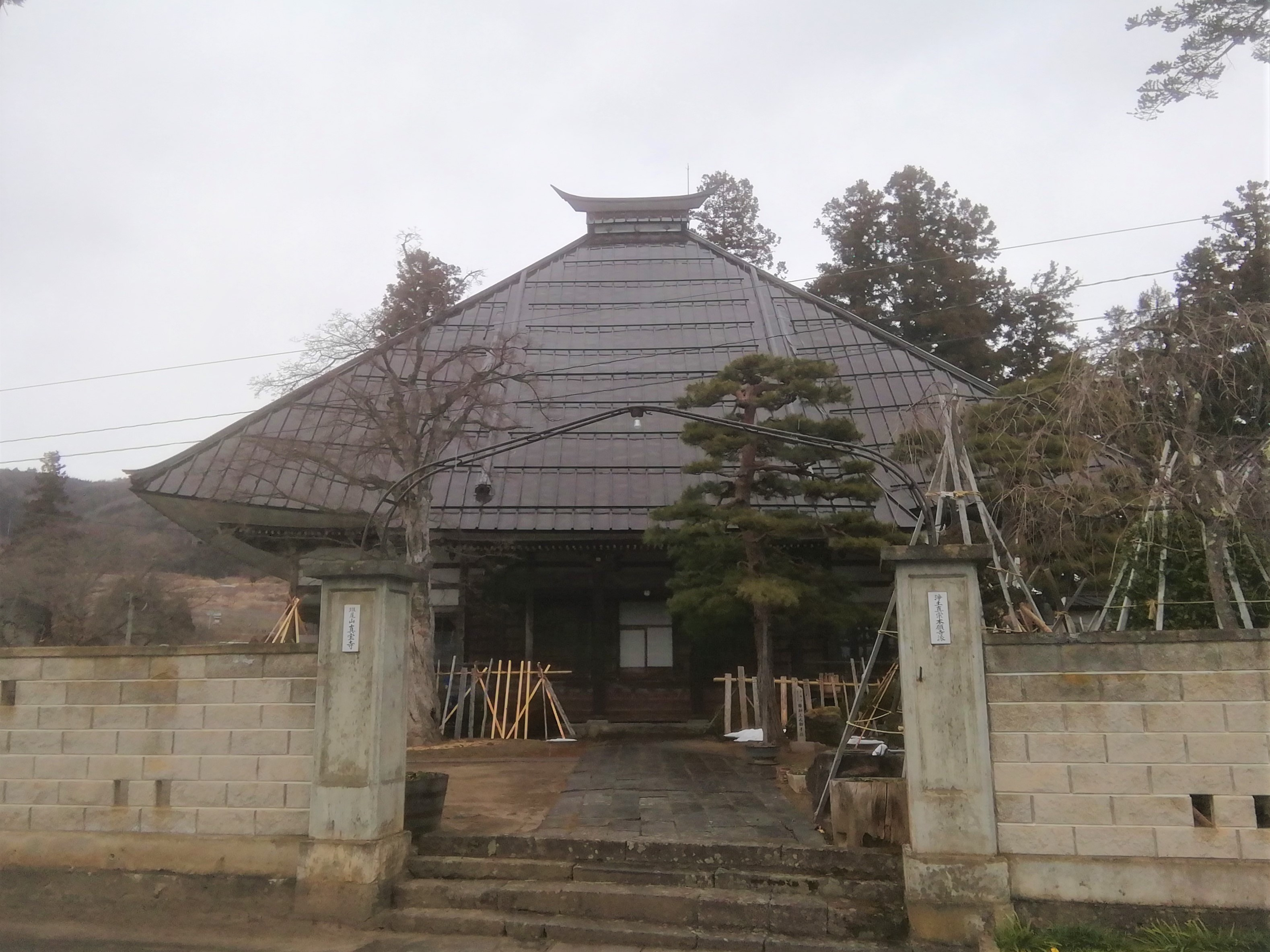 真宝寺（2020-2-22）